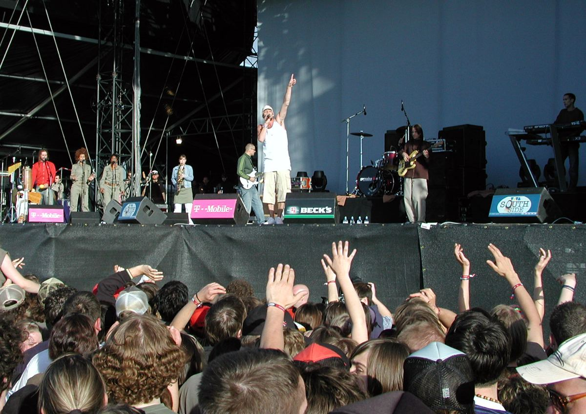 Live-Auftritt von „Gentleman & the Far East Band“ auf dem Southside-Festival